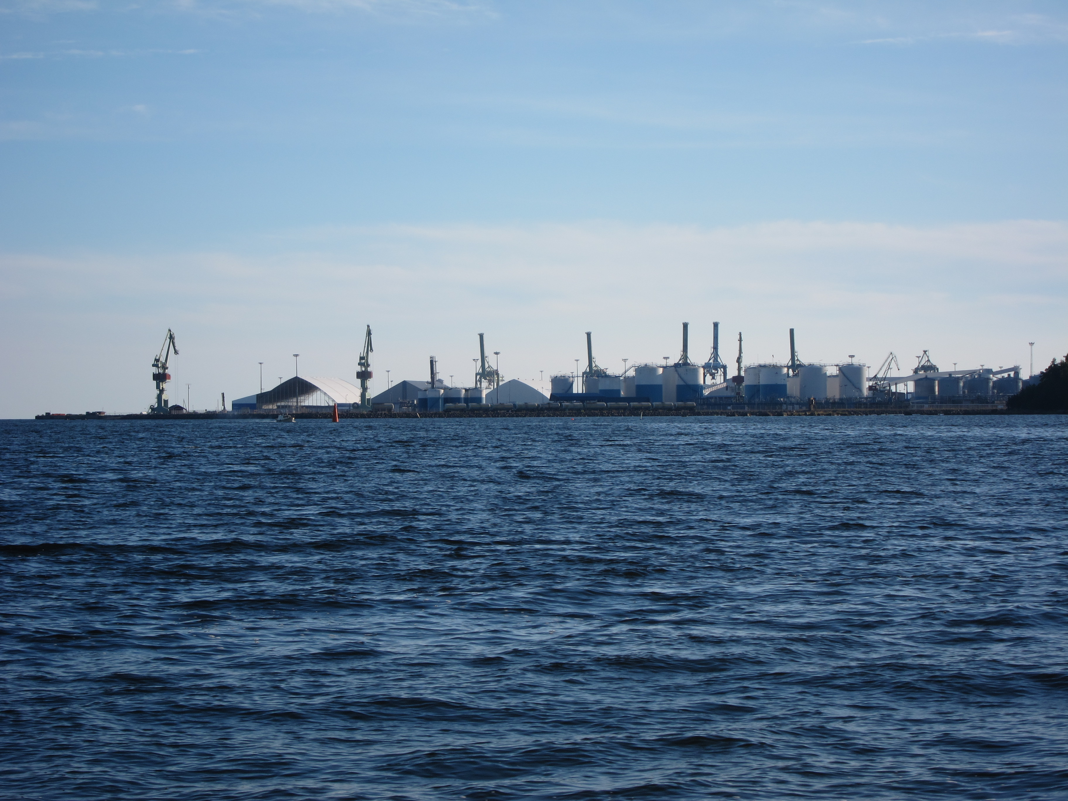 Mussalon satamaa Kotkassa.